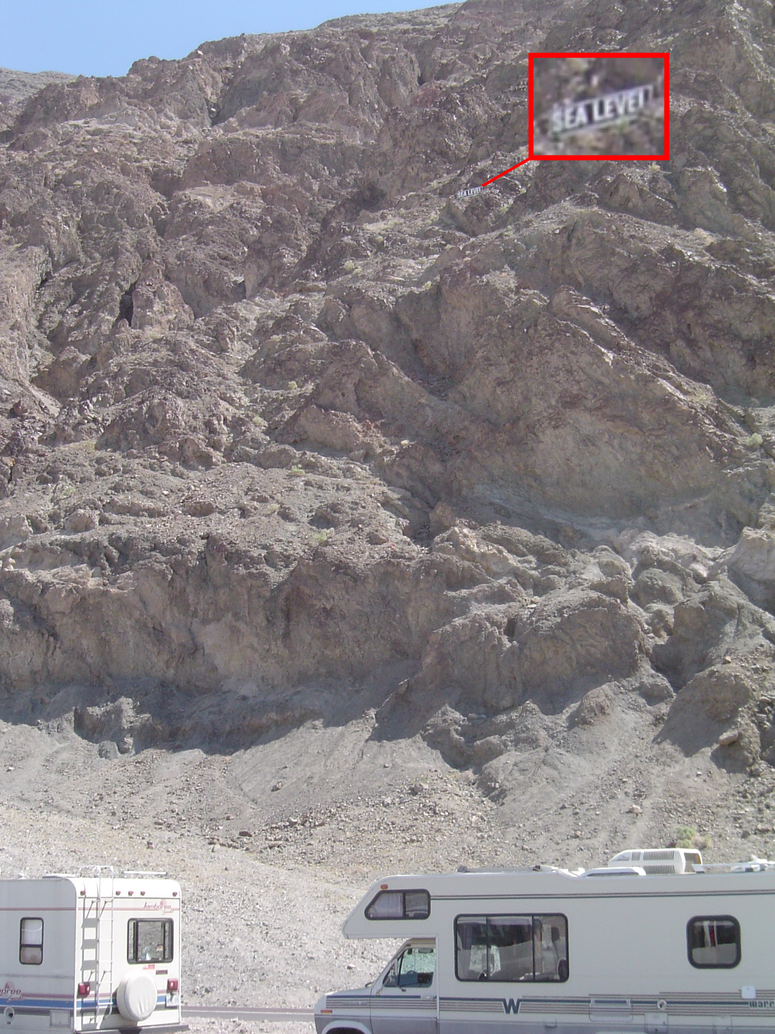 Versione modificata di File:BadwaterSL.JPG per poter meglio vedere il cartello "Sea level".